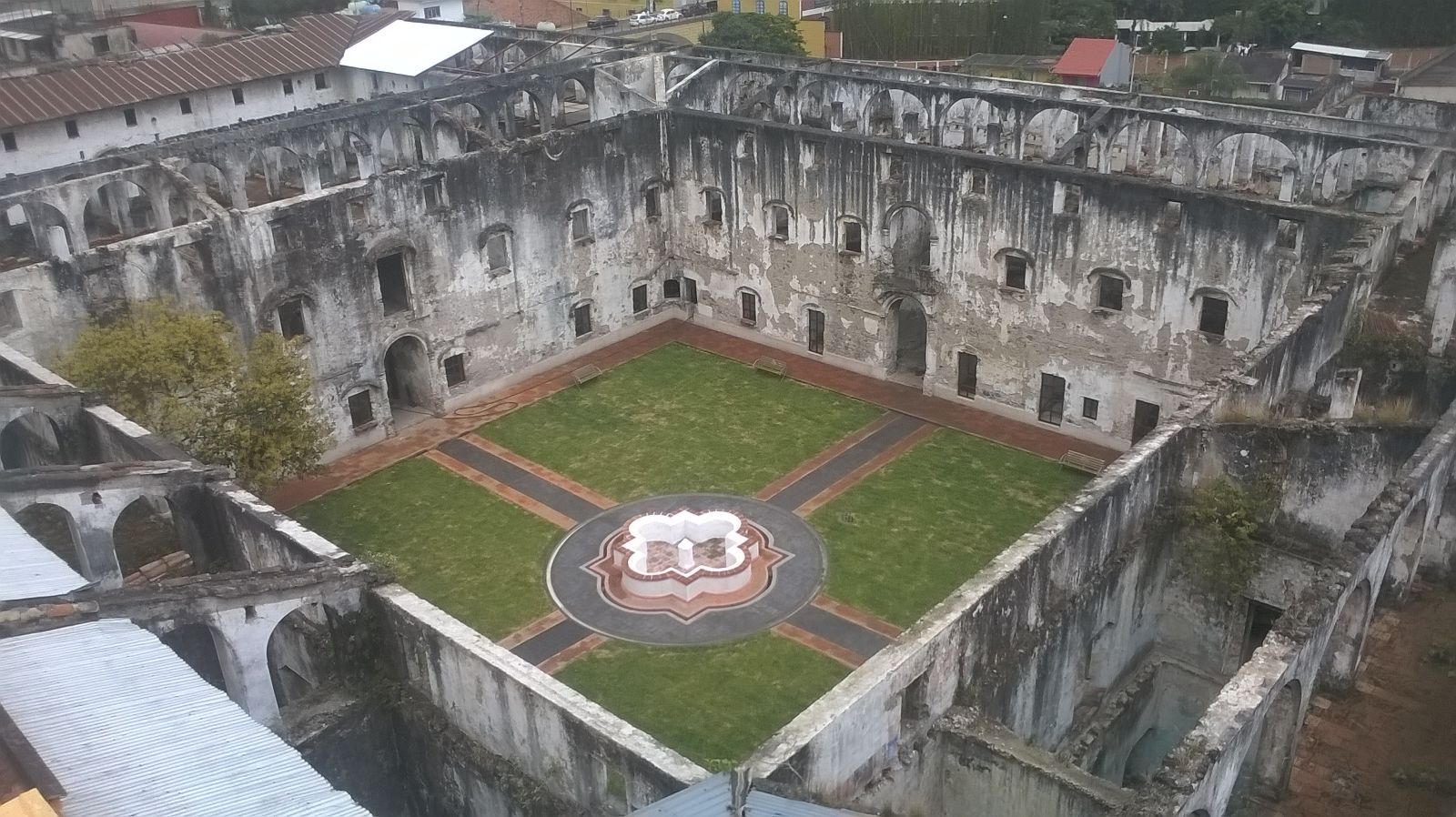 Vista del exconvento desde la torre del templo de San José